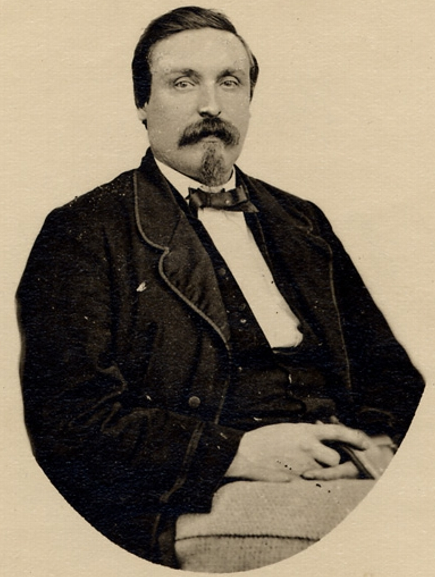 Célestin Lavigueur, musician and composer